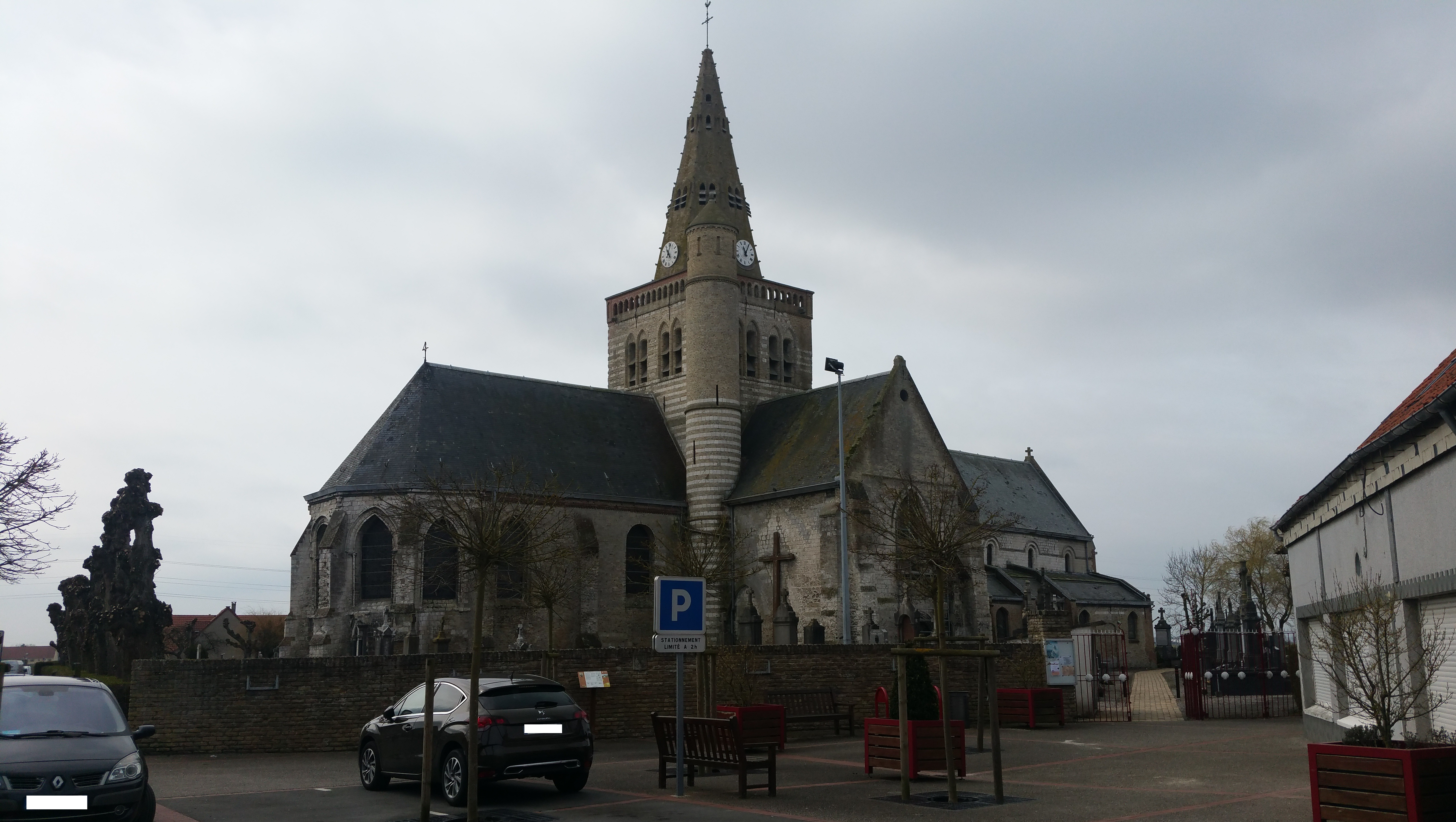 Vue de l'église Saint-Jacques-le-Majeur de Cappelle-Brouck.